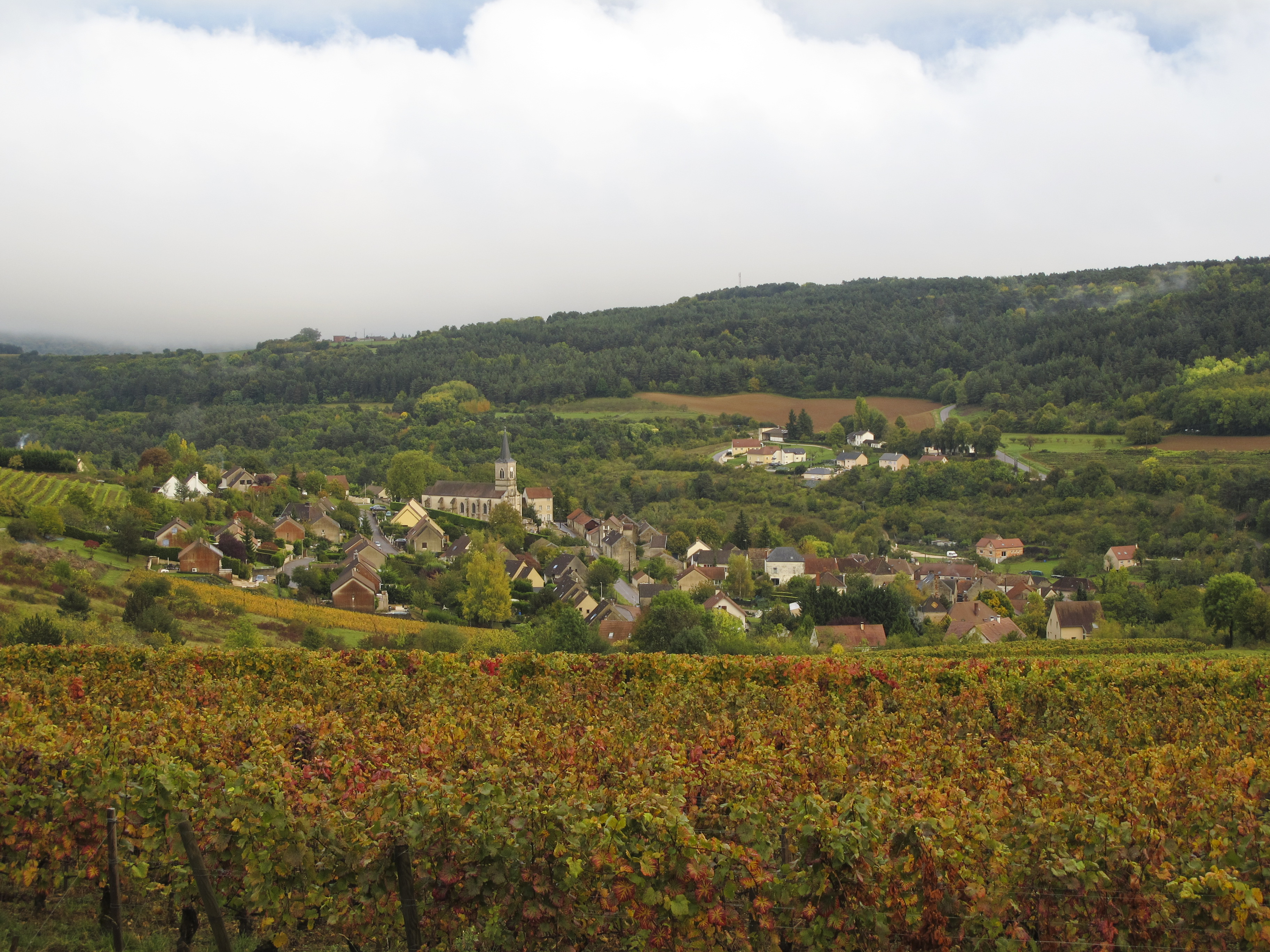 Village d'Arcenant et les vignes en automne